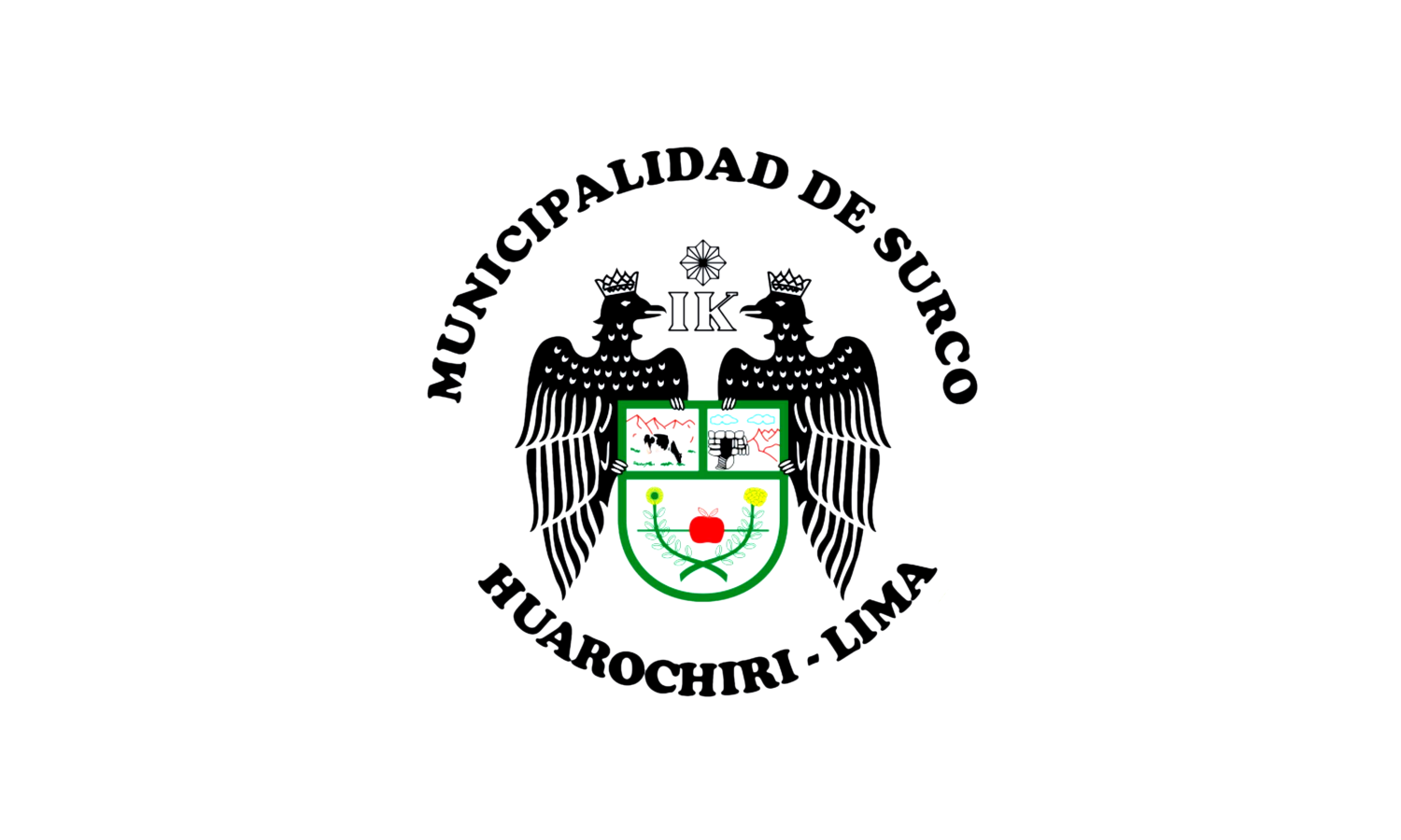 Bandera color blanco y el escudo en centro